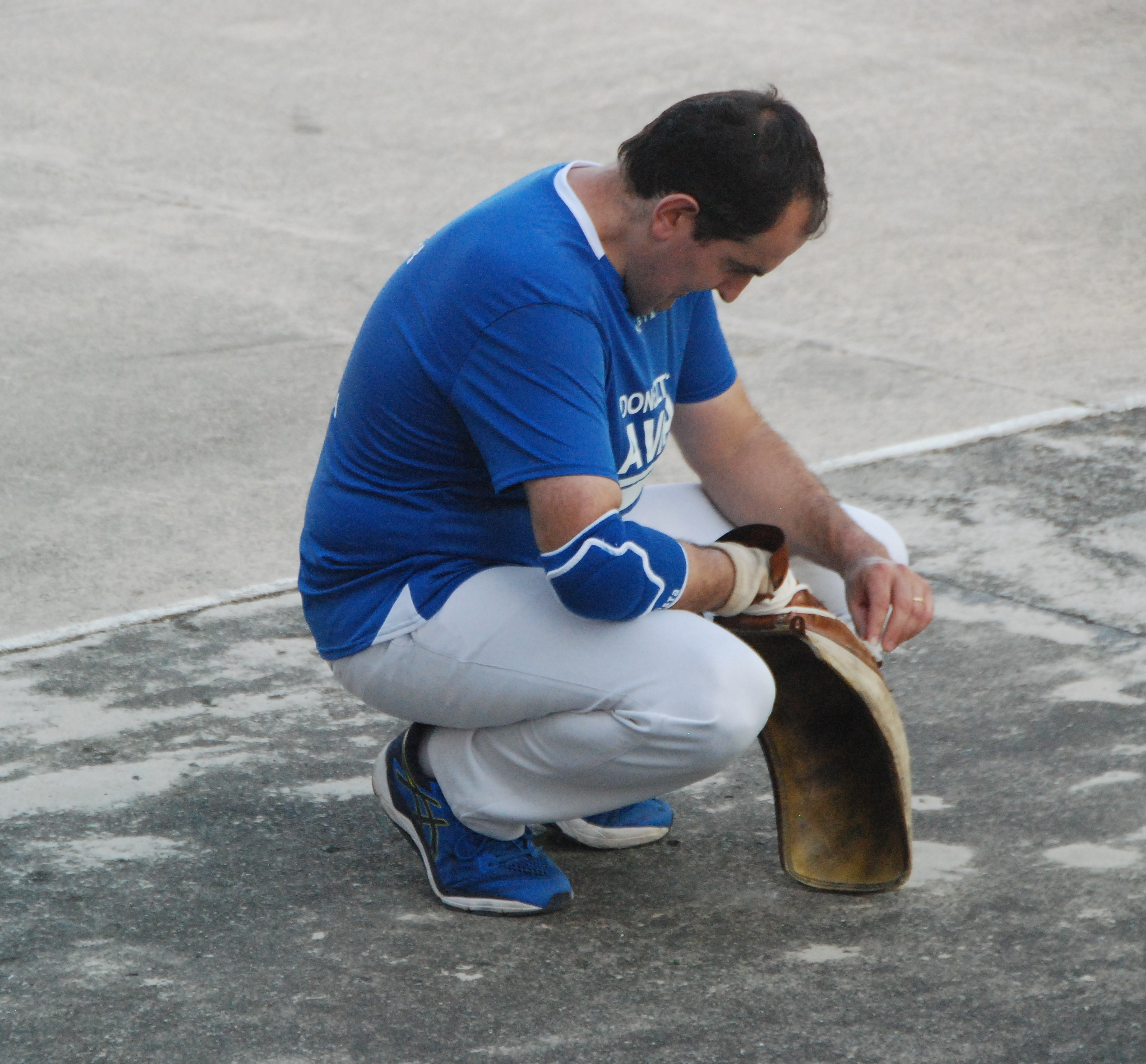 Laxo pilota-jokoa Malerrekako Oitz herrian 2018ko finala.